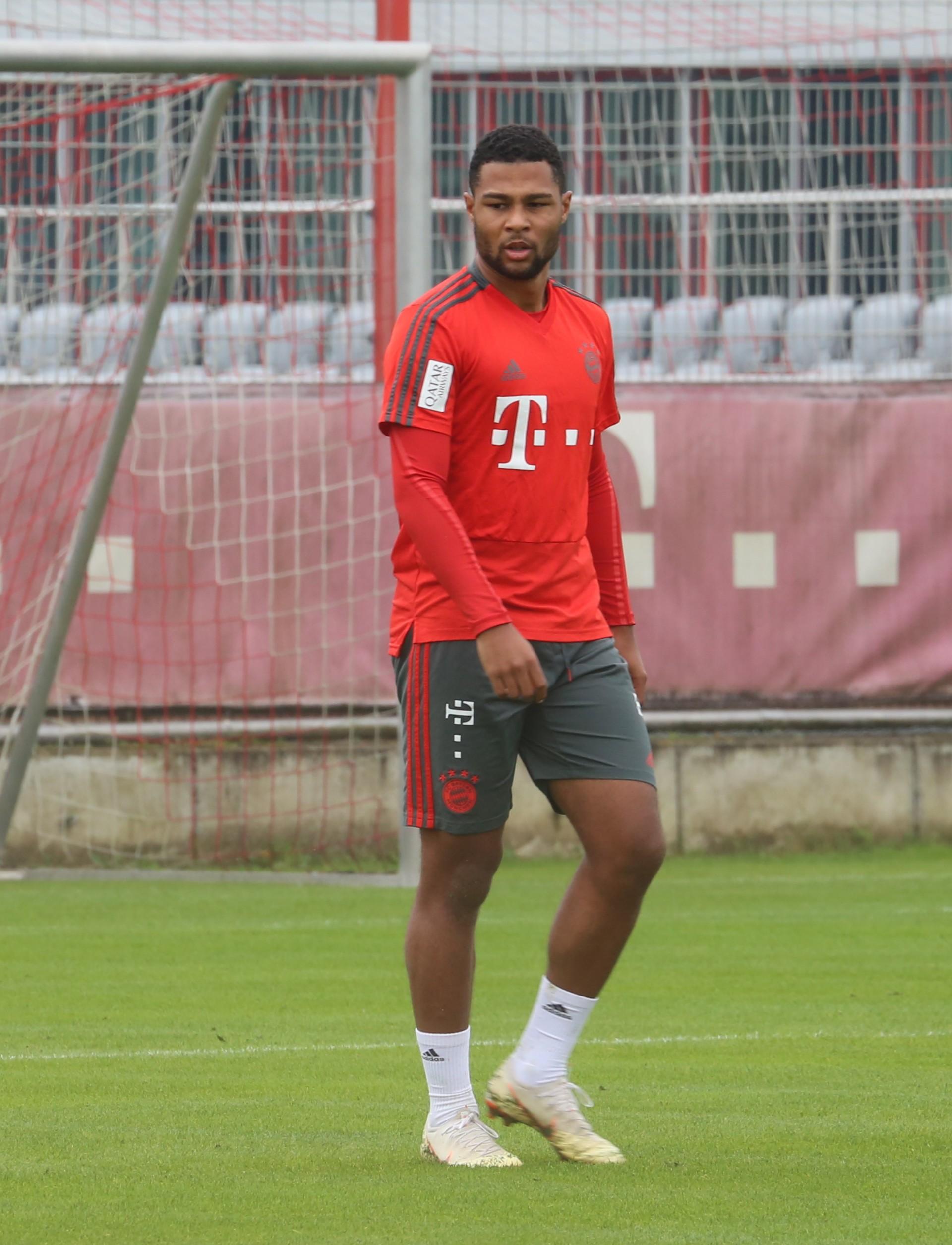 Serge Gnabry, am 9. Oktober 2018 beim Training auf dem Gelände des FC Bayern München